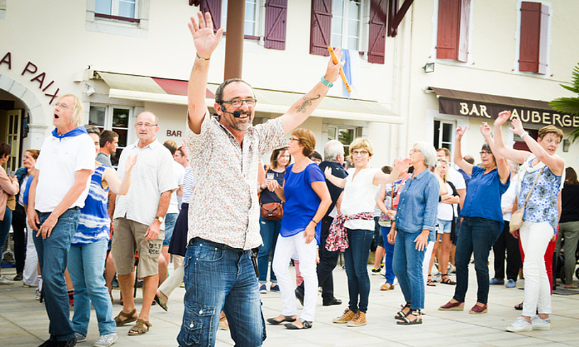 Publikoaren erdian azaltzen ditu Patxi Perezek urratsak dantza pikoetan.Argazkia: ISABELLE MIQUELESTORENA